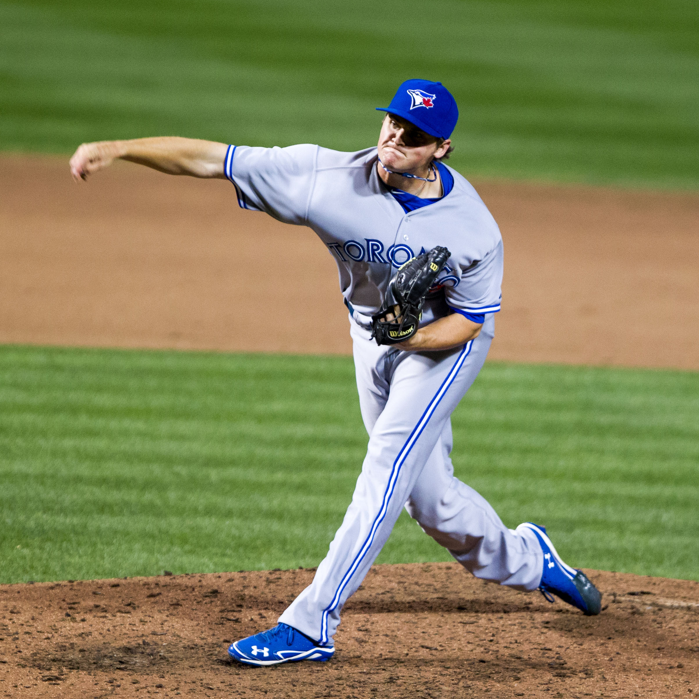 Chad Jenkins